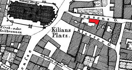 Heilbronn Stadtplan 1834, Präsenzgasse 4 (35 A), später Kaiserstraße 44.jpg